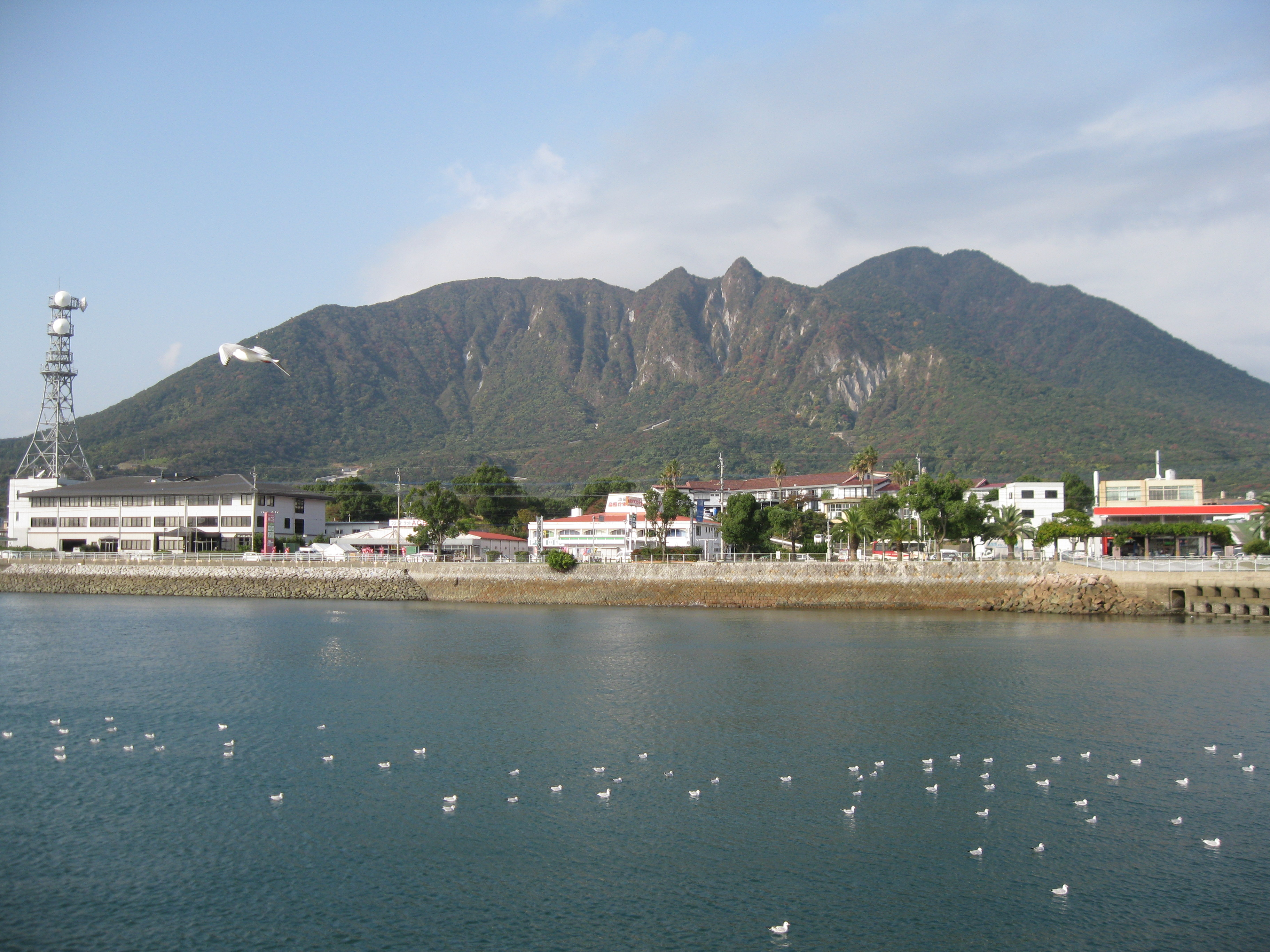 Shimabara and Mayuyama. Trip to Fukuoka, Karatsu, Arita, Nagasaki, Unzen, Shimabara and Kumamoto. Nov 7-17, 2010